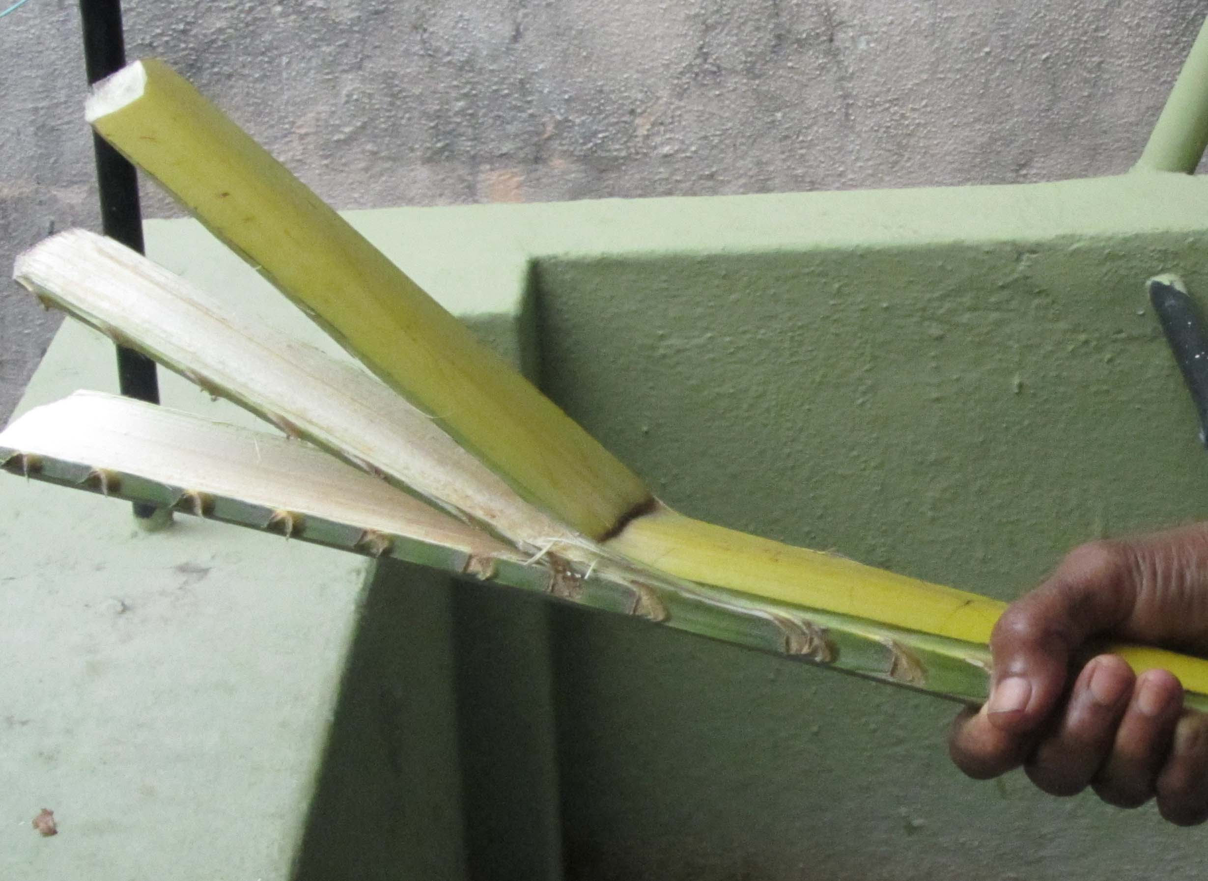 தட்டை, விளையாட்டுக் கருவி, தட்டப்படுவதால் தட்டை. சங்ககாலத்தில் தினைப்புனம் காக்கும் மகளிர் கிளியோட்டப் பயன்படுத்தினர். நாட்டுப்புறங்களில் சிறுவர் சிறுமியரின் விளையாட்டுக் கருவி. own shot